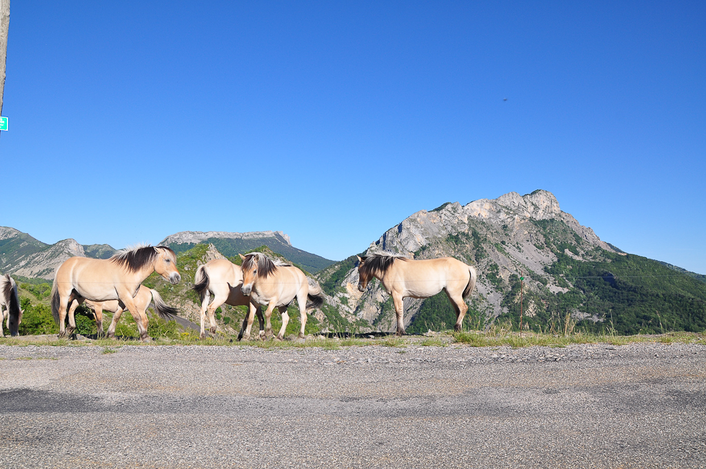 Chevaux de race fjord en liberté à Saint-Geniez en Haute Provece